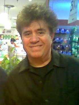 Pedro Almodóvar en Zamora.